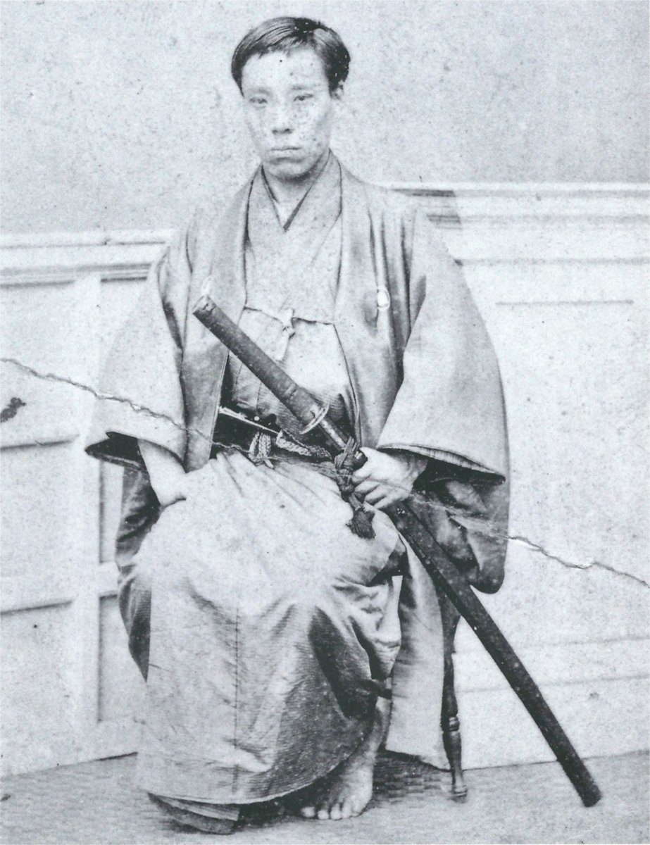 a Japanese man 高杉晋作 (Shinsaku Takasugi)